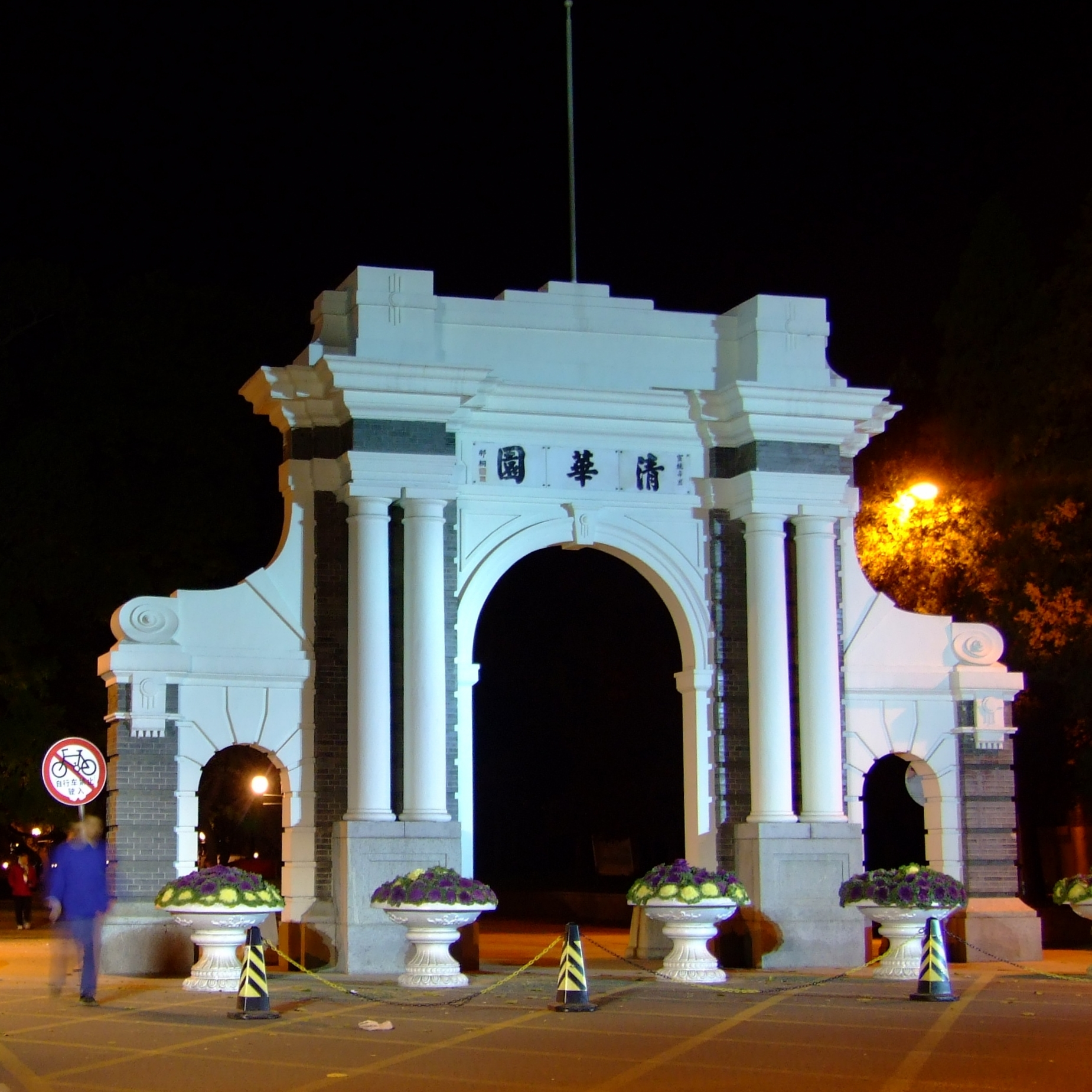 2008年北京奥运会之后，粉刷一新的清华大学二校门。